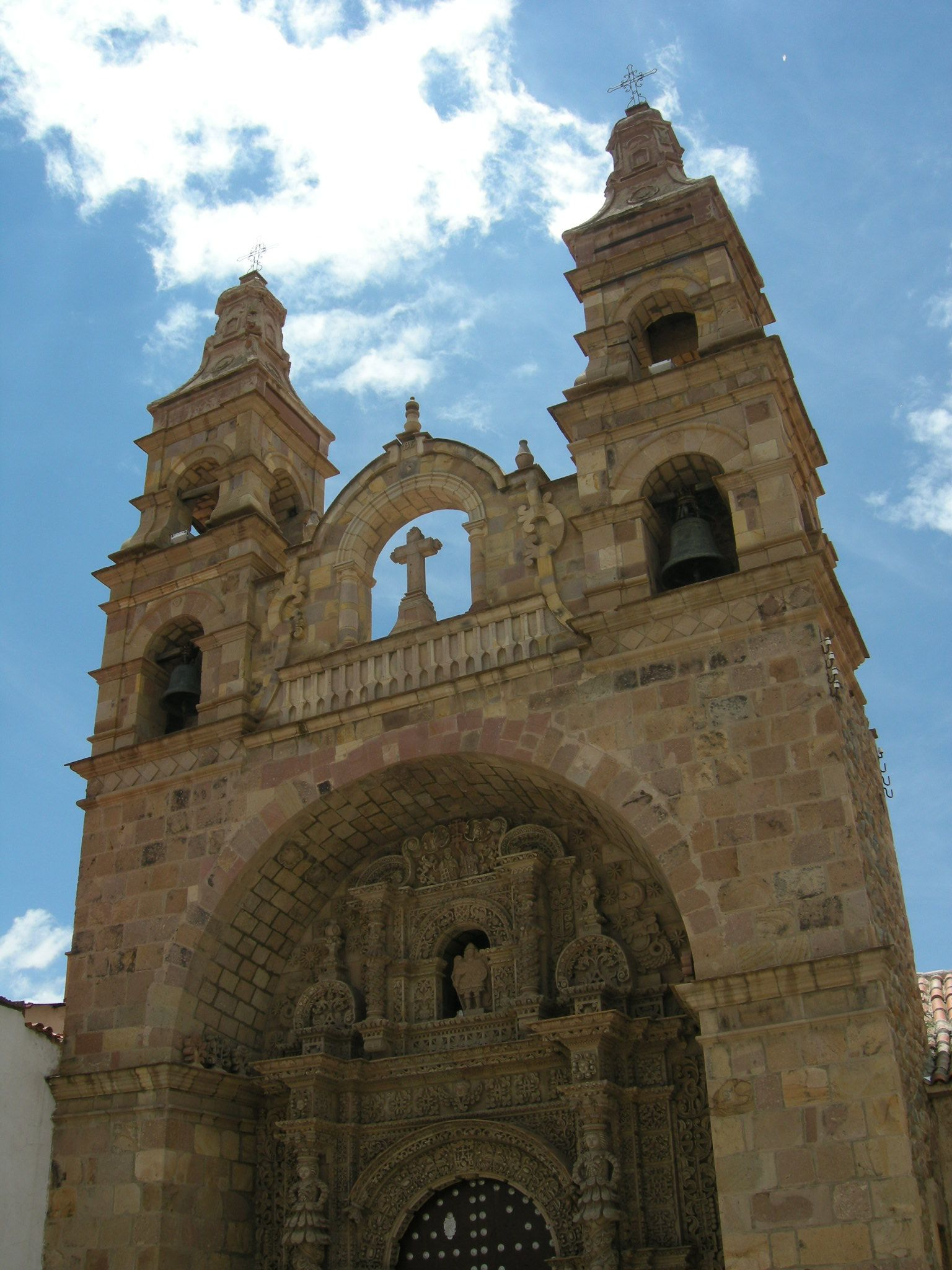 Iglesia de San Lorenzo en la ciudad de Potosí, famosa por su portada de estilo plateresco.